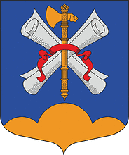 Герб МО Каменногорского городское поселение Выборгского района Ленинградской области